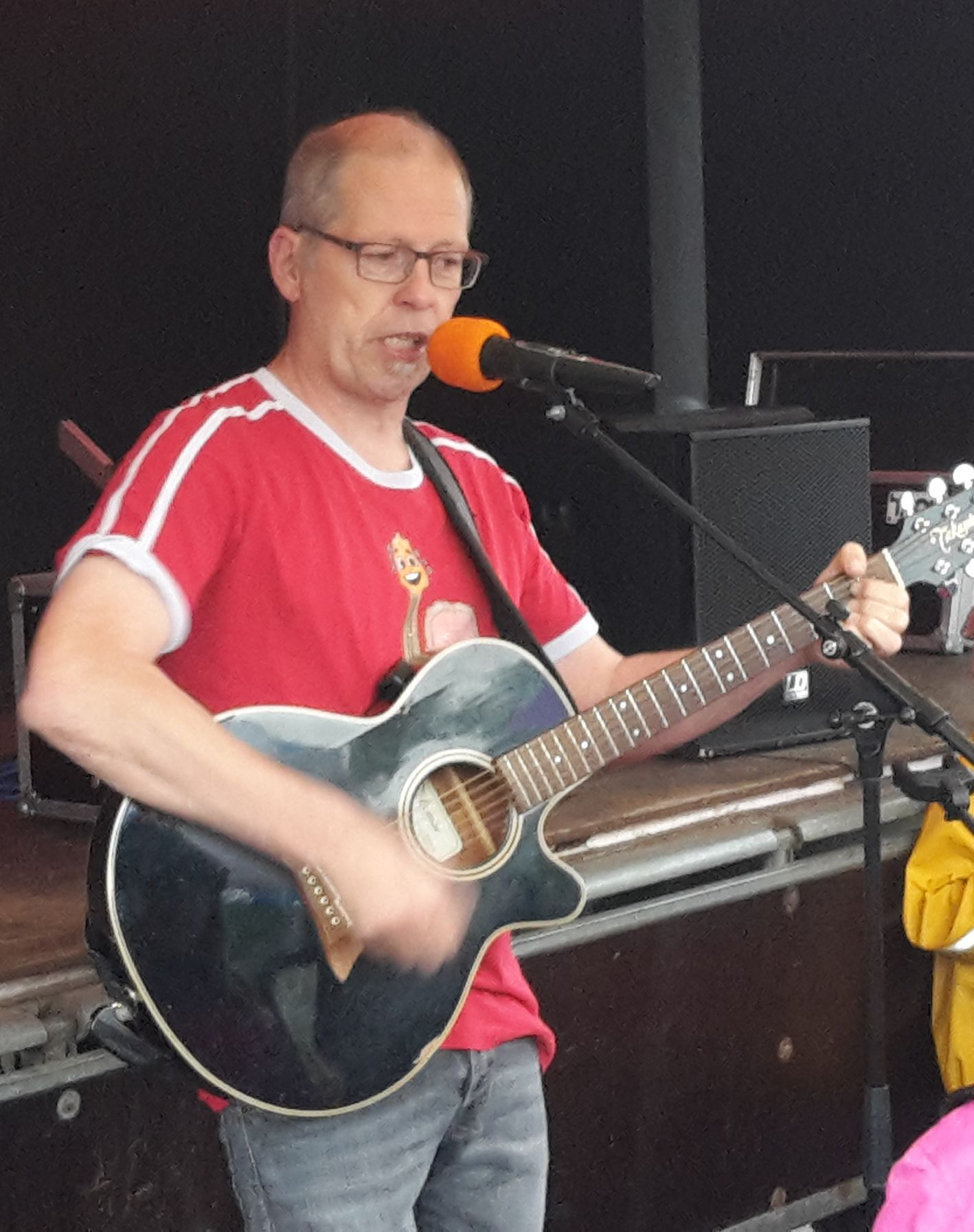 Matthias Meyer-Göllner auf einem Kinderliedermitmachkonzert in Aukrug